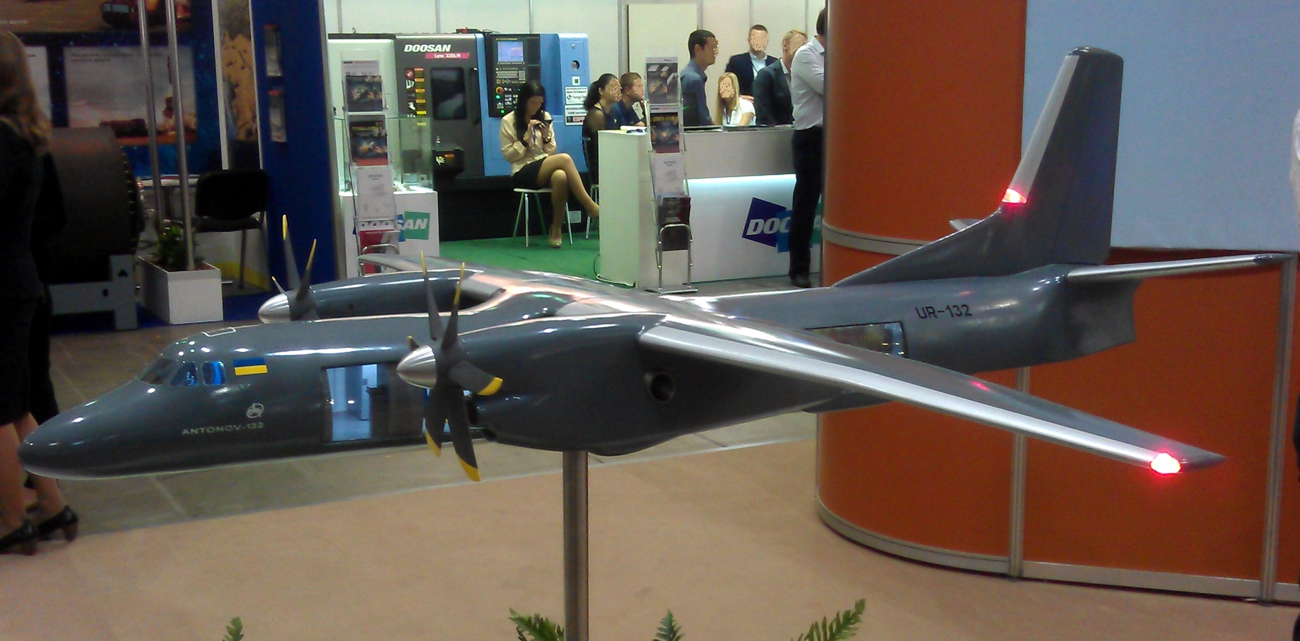 Легкий транспортный самолет Ан-132. Масштабная модель. Выставка "Зброя та безпека", Киев, сентябрь 2015 г.